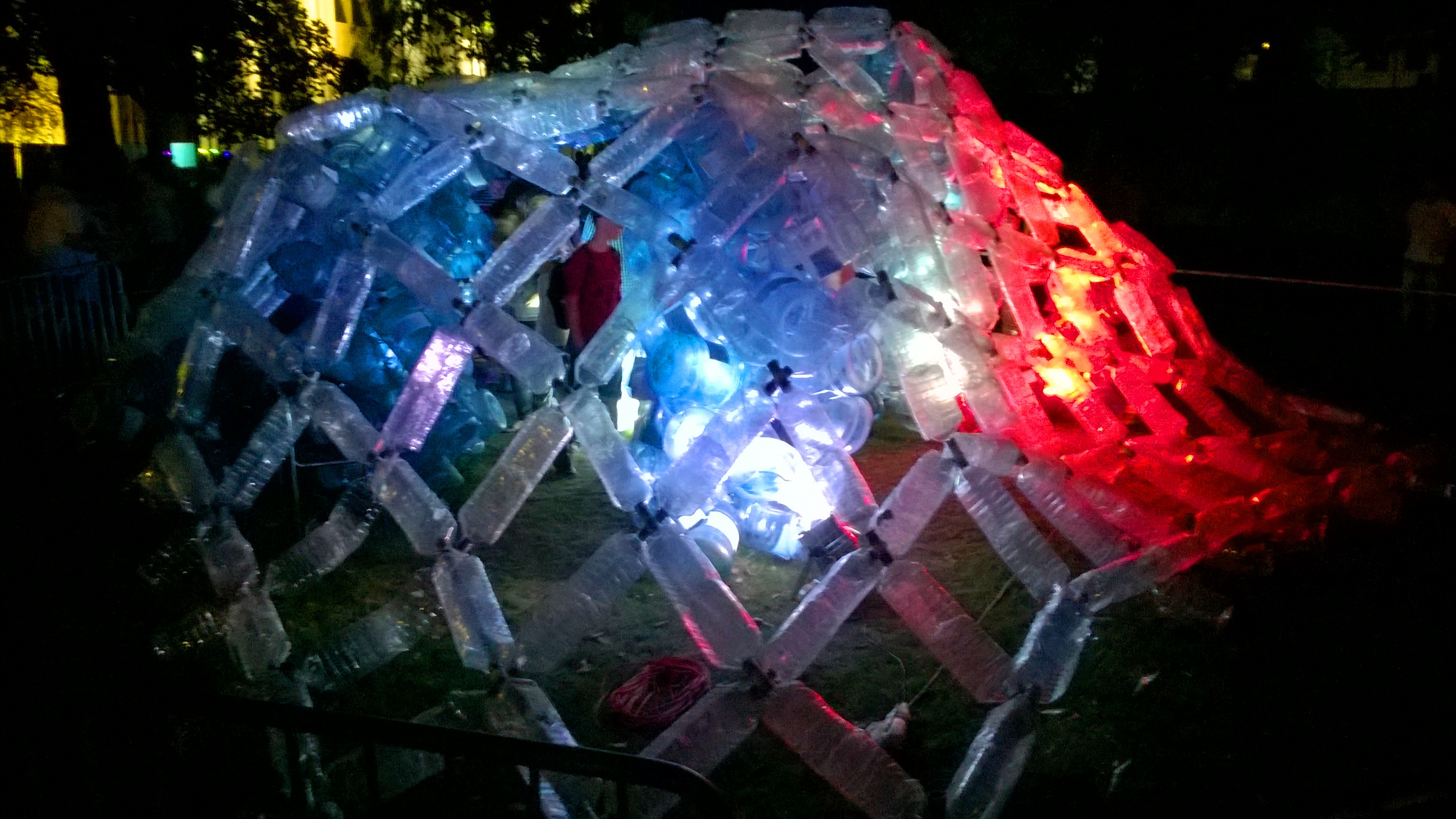 Bella Skyway Festival 2016 - Instalacja "Aquapolis"